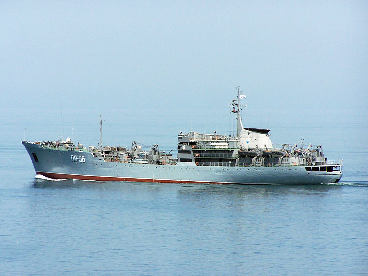 Плавающая мастерская "ПМ-56". Проект 304. Севастополь. Черноморский флот РФ.